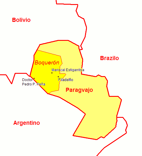 Description / Priskribo